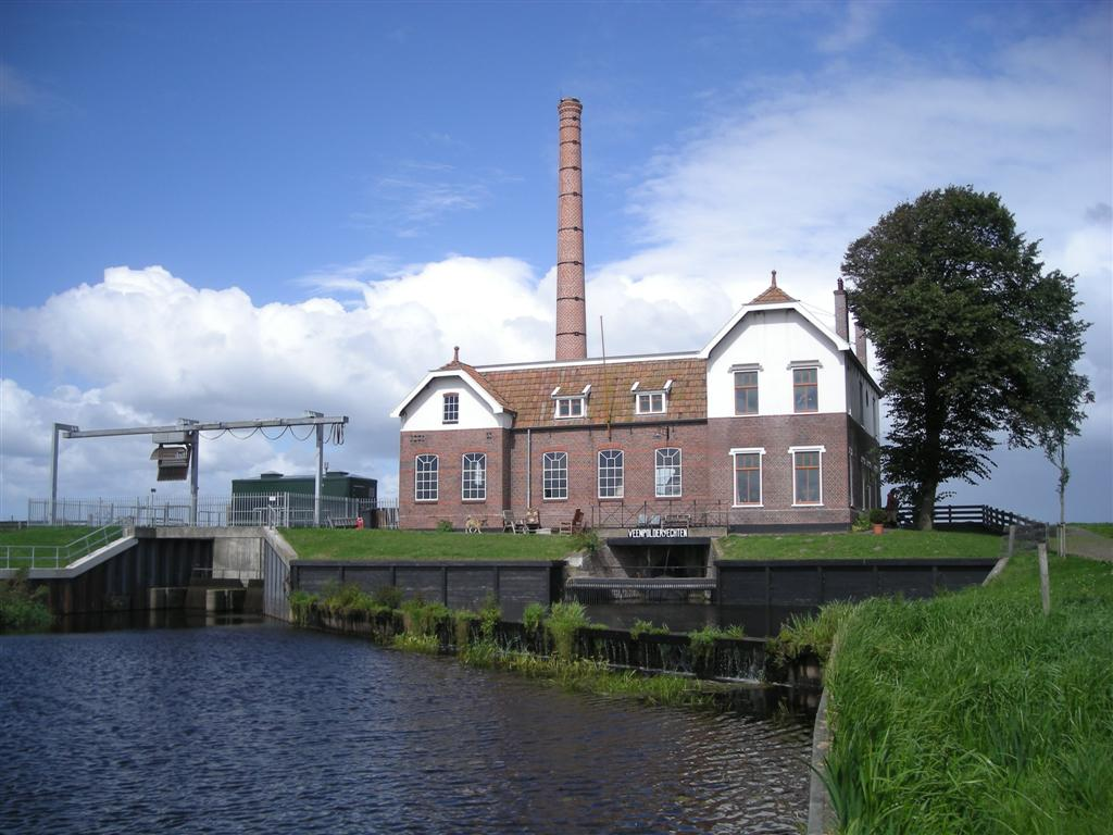 Gemaal bij Echten in Friesland